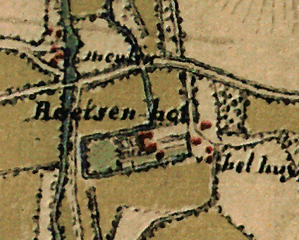 Haus Ingenray in Geldern-Pont auf der Tranchotkarte